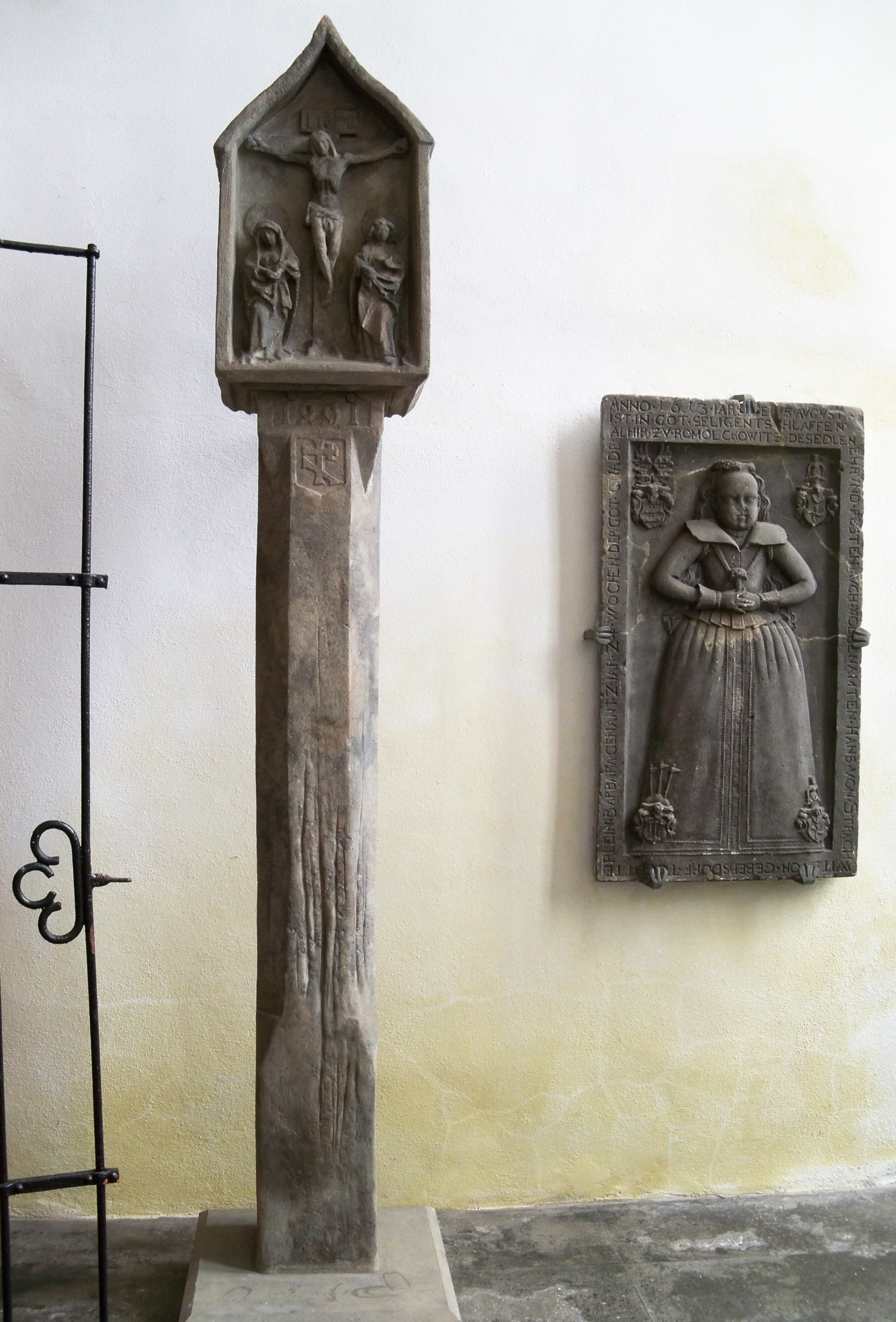 Katedra polskokatolickaj we Wrocławiu.